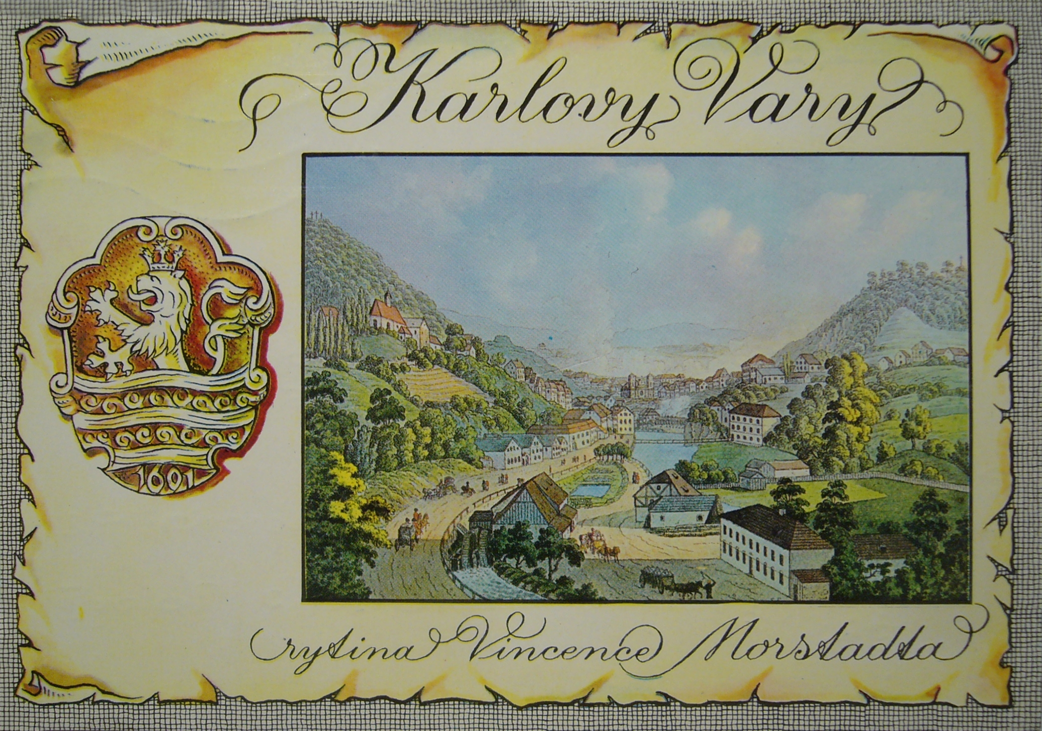 Karlovy Vary: rytina Vincenc Morstadt